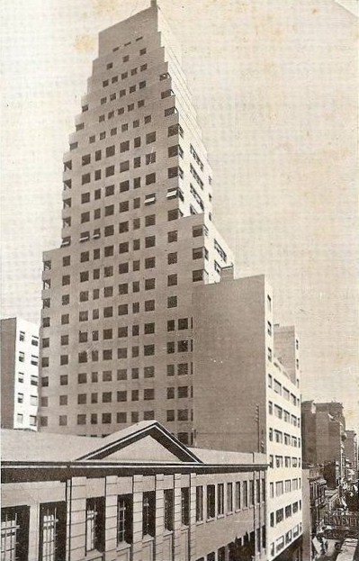 Edificio SAFICO, en la Avenida Corrientes nº 456. Buenos Aires, Argentina.